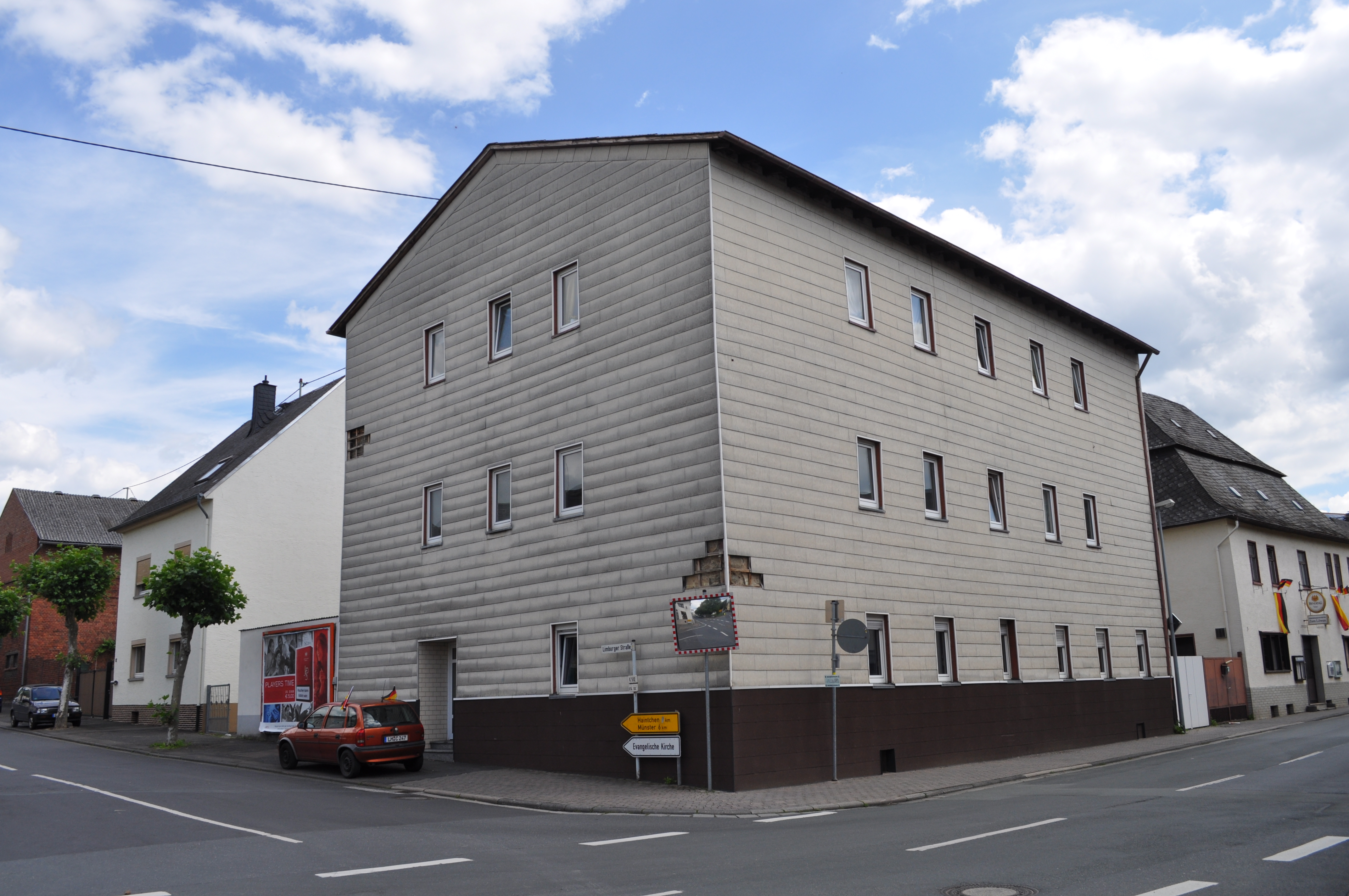 Niederselters, Limburger Straße 10